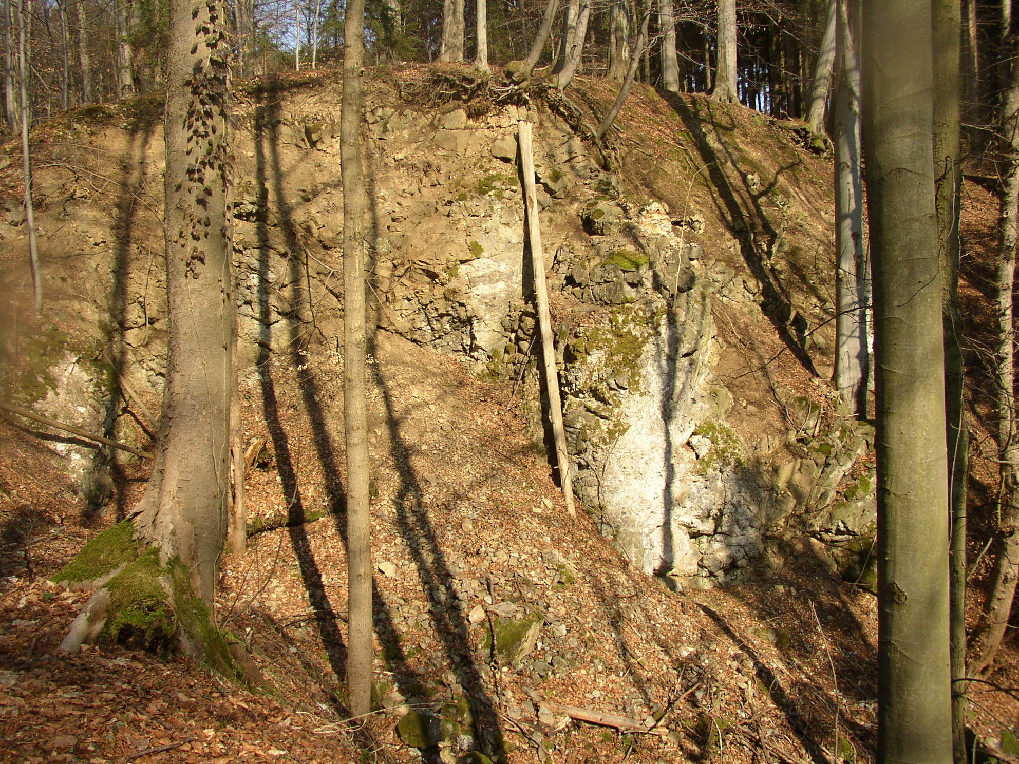 Vápenka, okres Děčín, Ústecký kraj, Česká republika